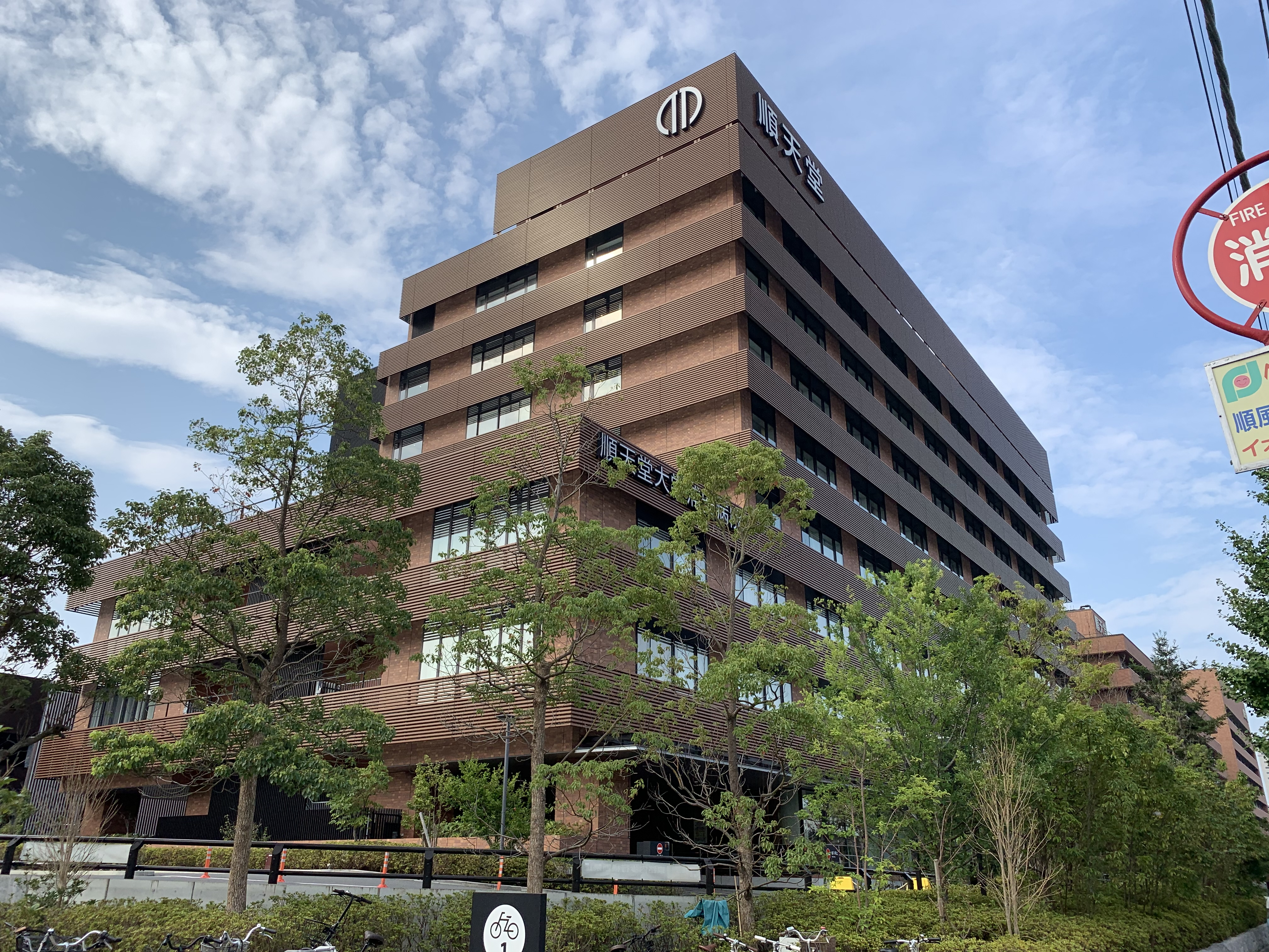 順天堂大学医学部附属浦安病院を南西側から撮影